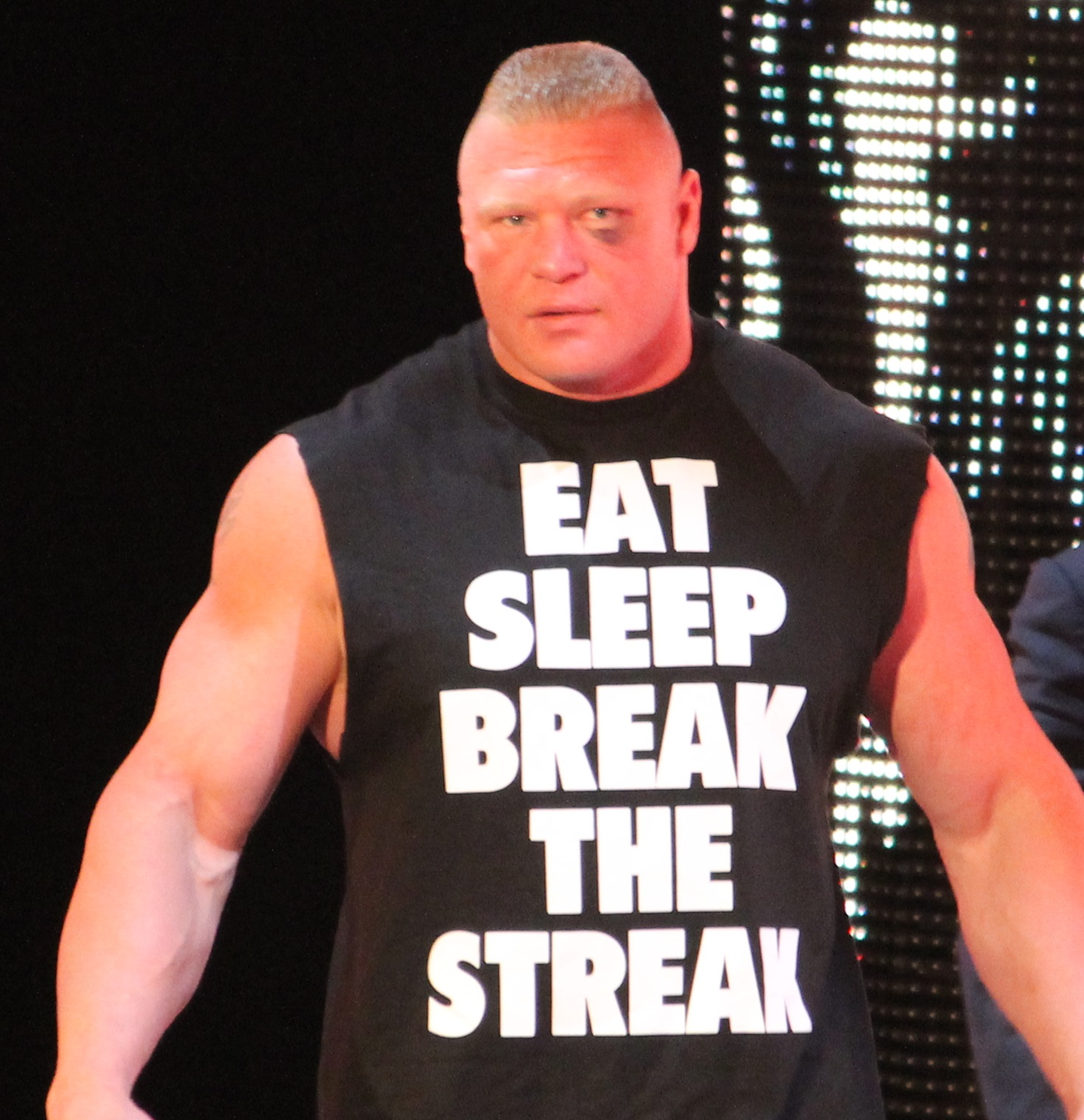 ritaglio di File:Brock Lesnar and Paul Heyman April 2014.jpg